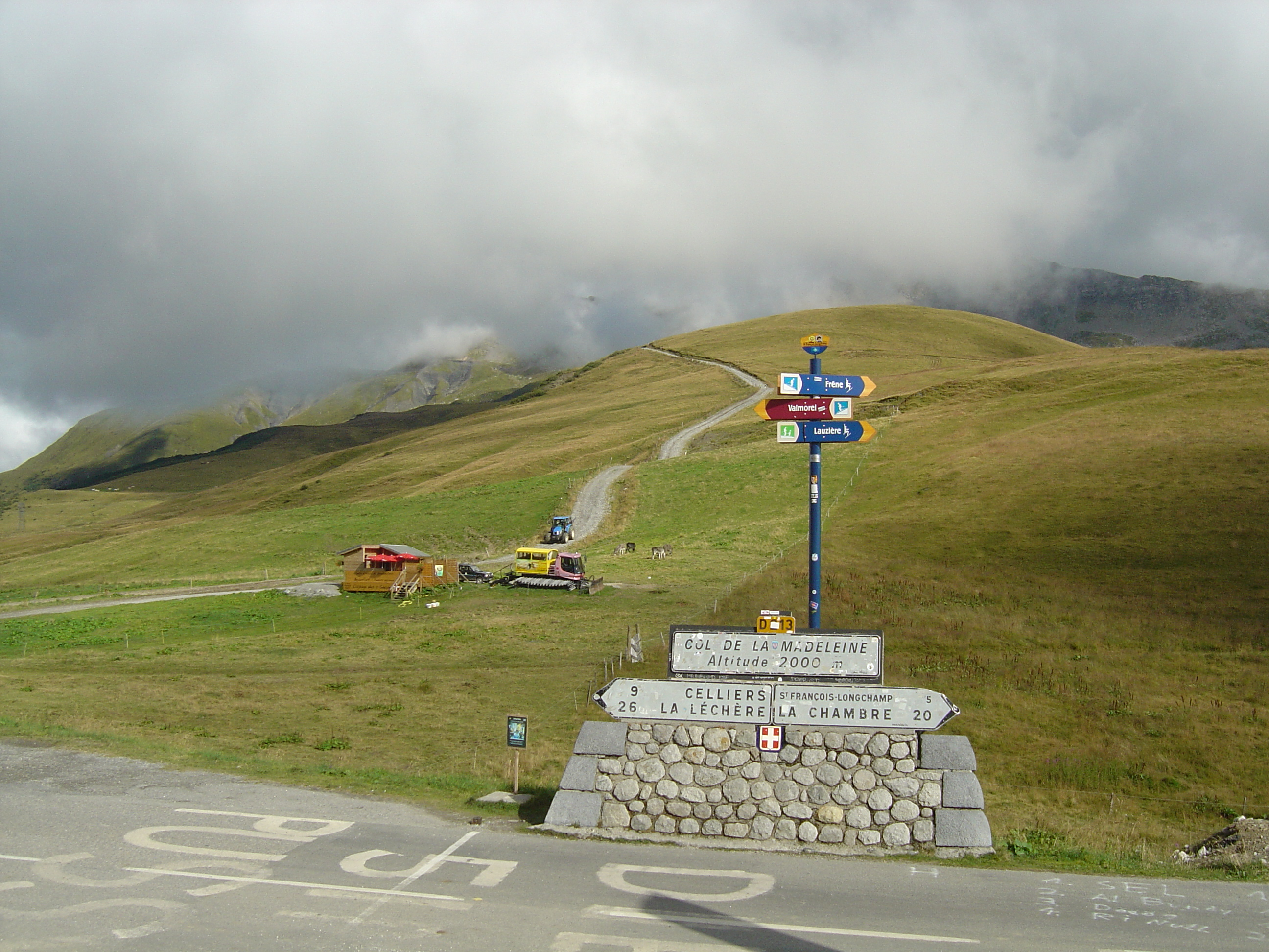 Col de la Madeleine (Savoie)